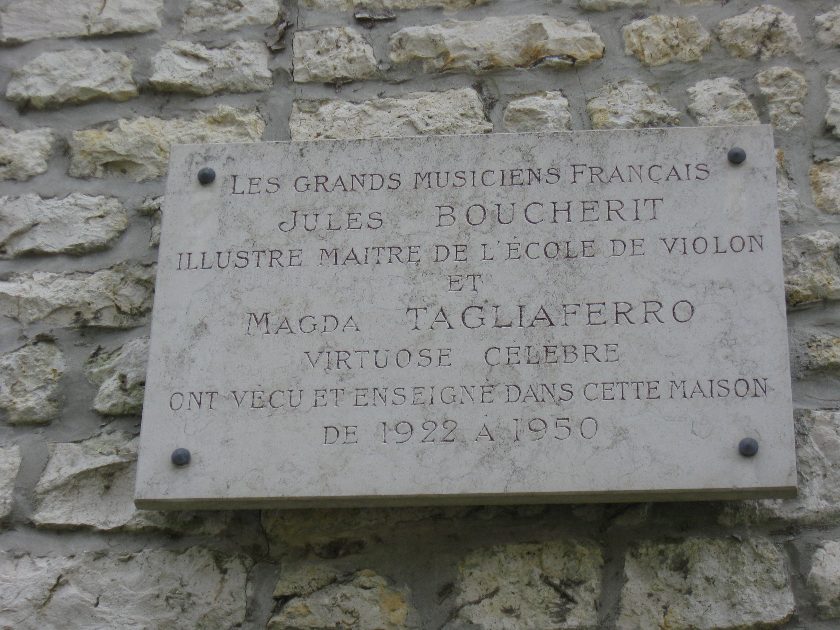 Villa « La Chansonnière », plaque commémorative. (rue Renault, Bourron-Marlotte, département de la Seine et Marne, région Île-de-France).